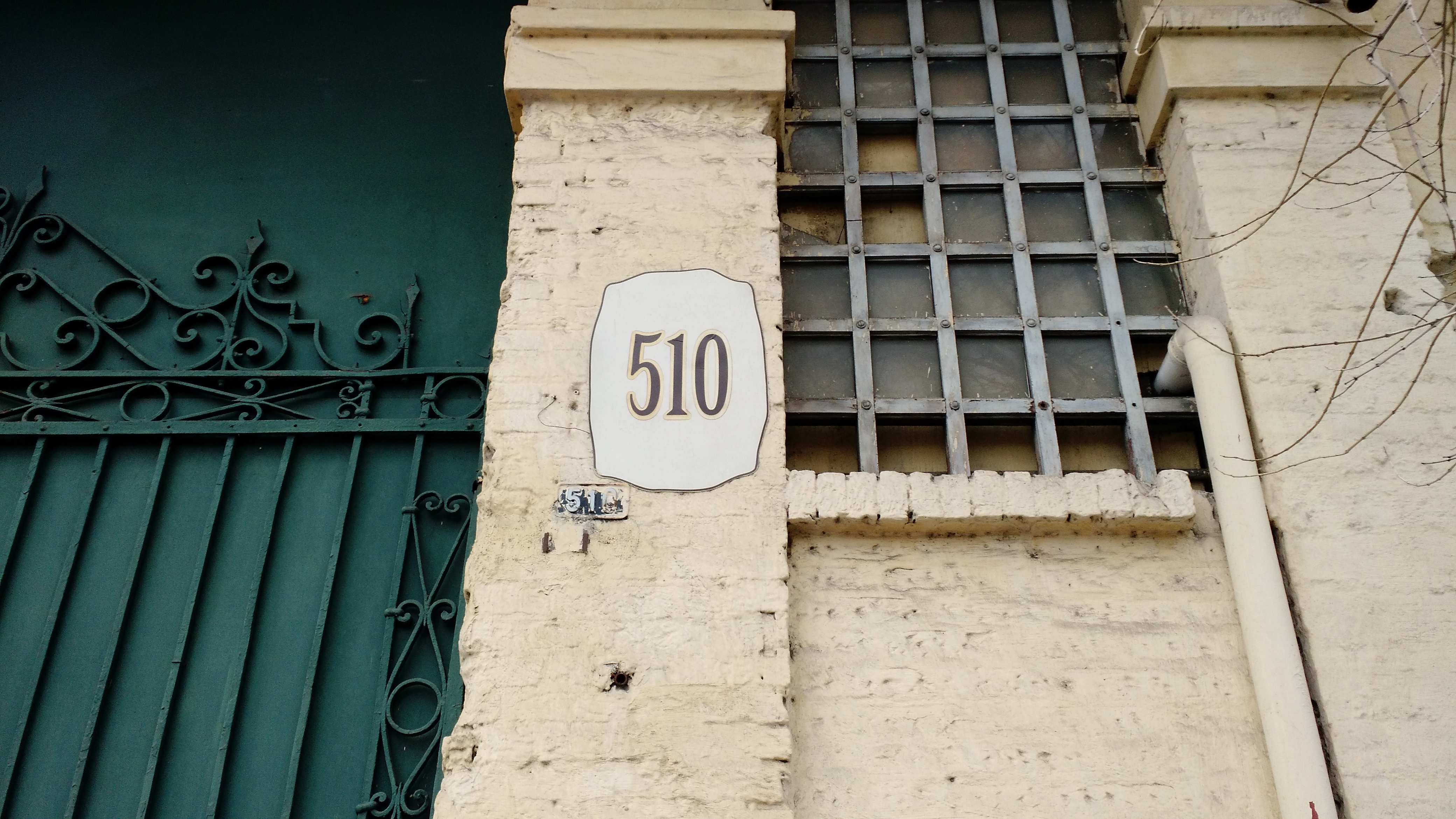 Área externa dos Moinhos Minetti Gamba